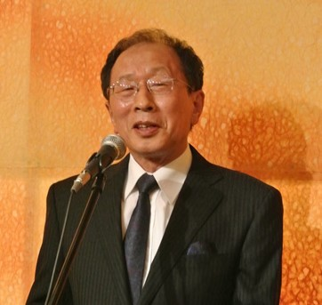 小林哲郎の写真